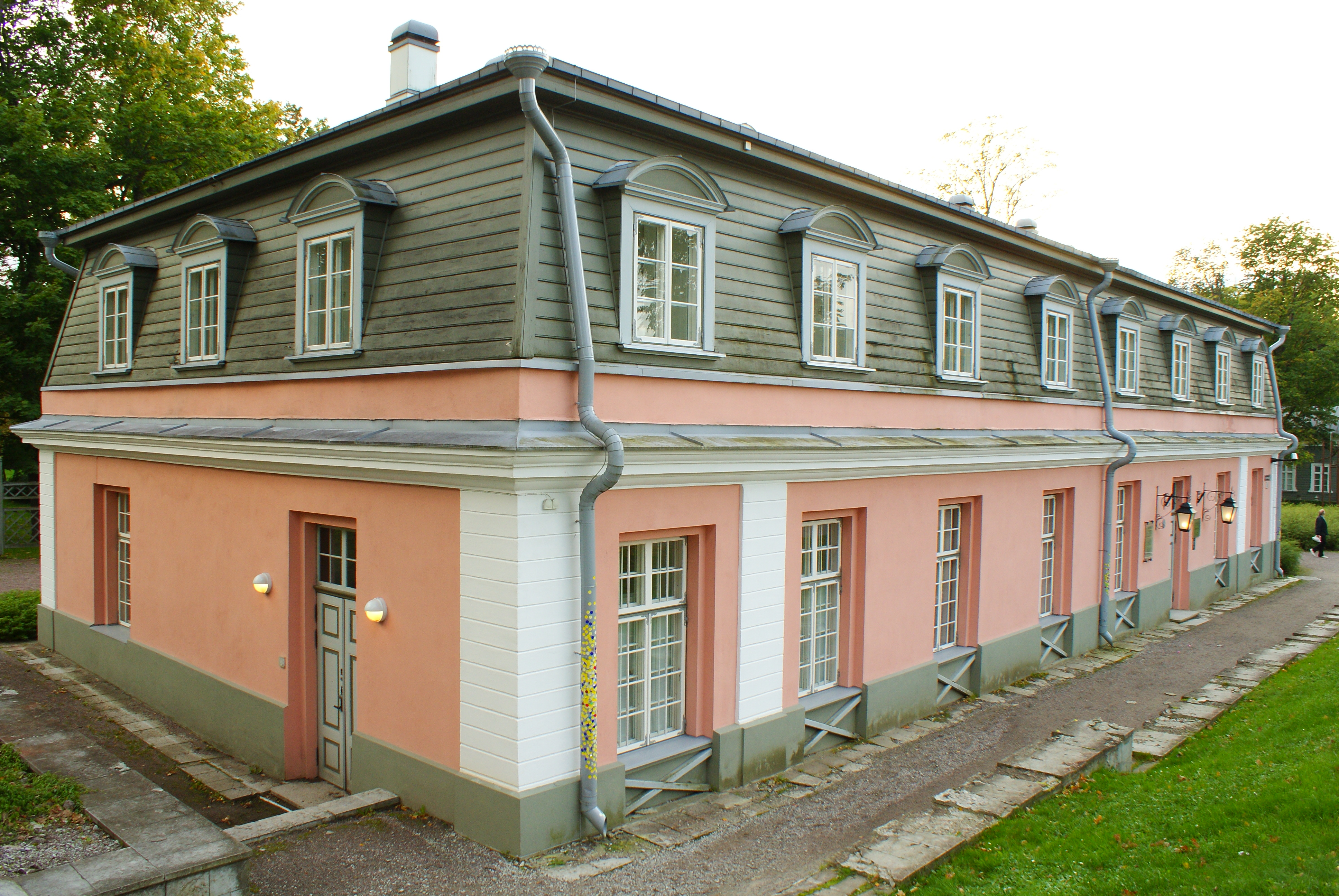 Kadrioru lossi köögihoone